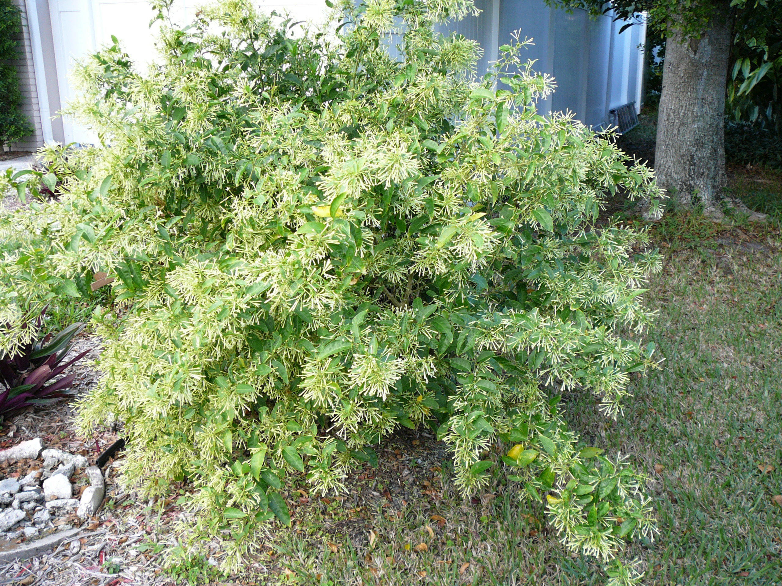 Night-blooming jasmine Cestrum nocturnum